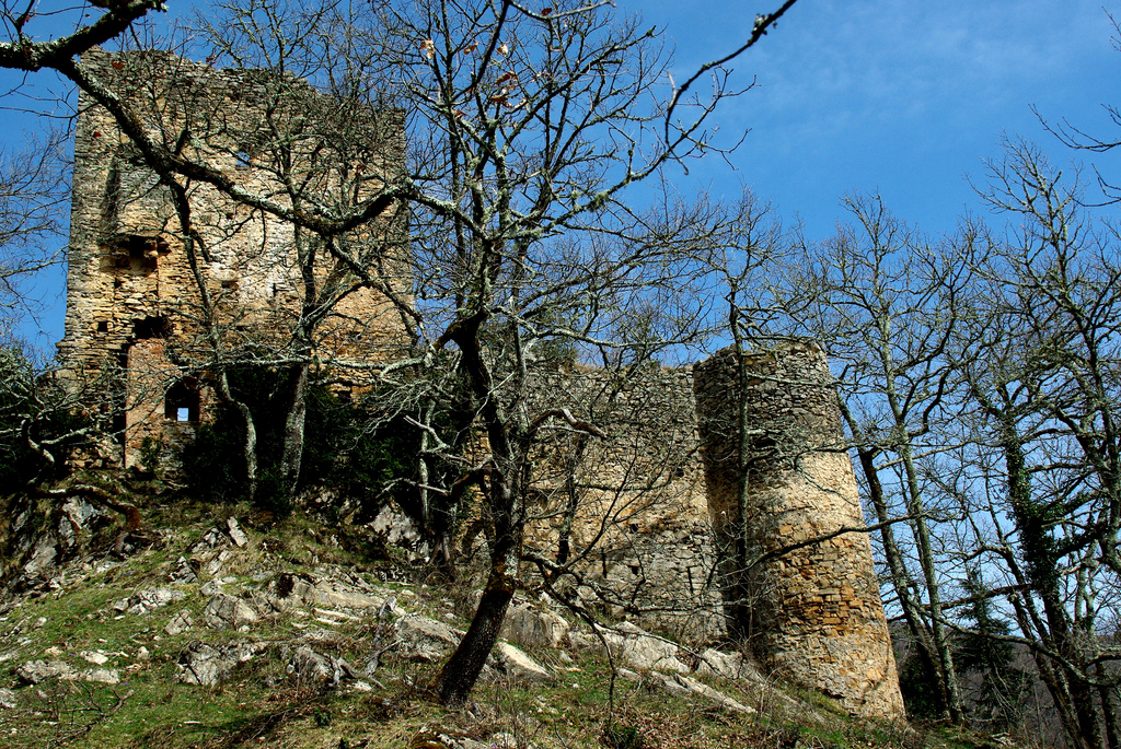 Perdu au milieu des bois, ce château présente encore trois tours d'angle rondes, un donjon carré et de hautes murailles. .